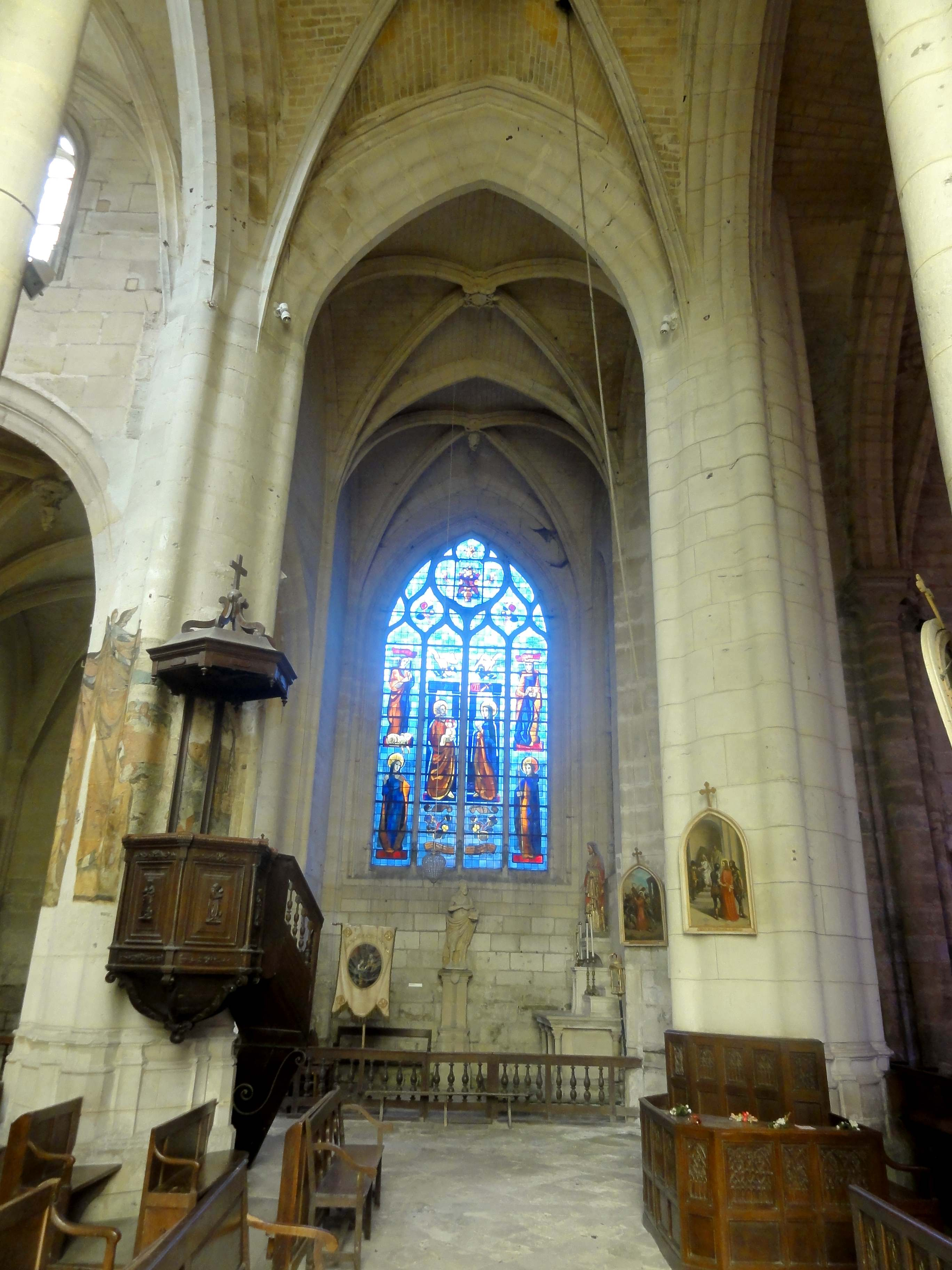 Croisée, vue vers le nord.